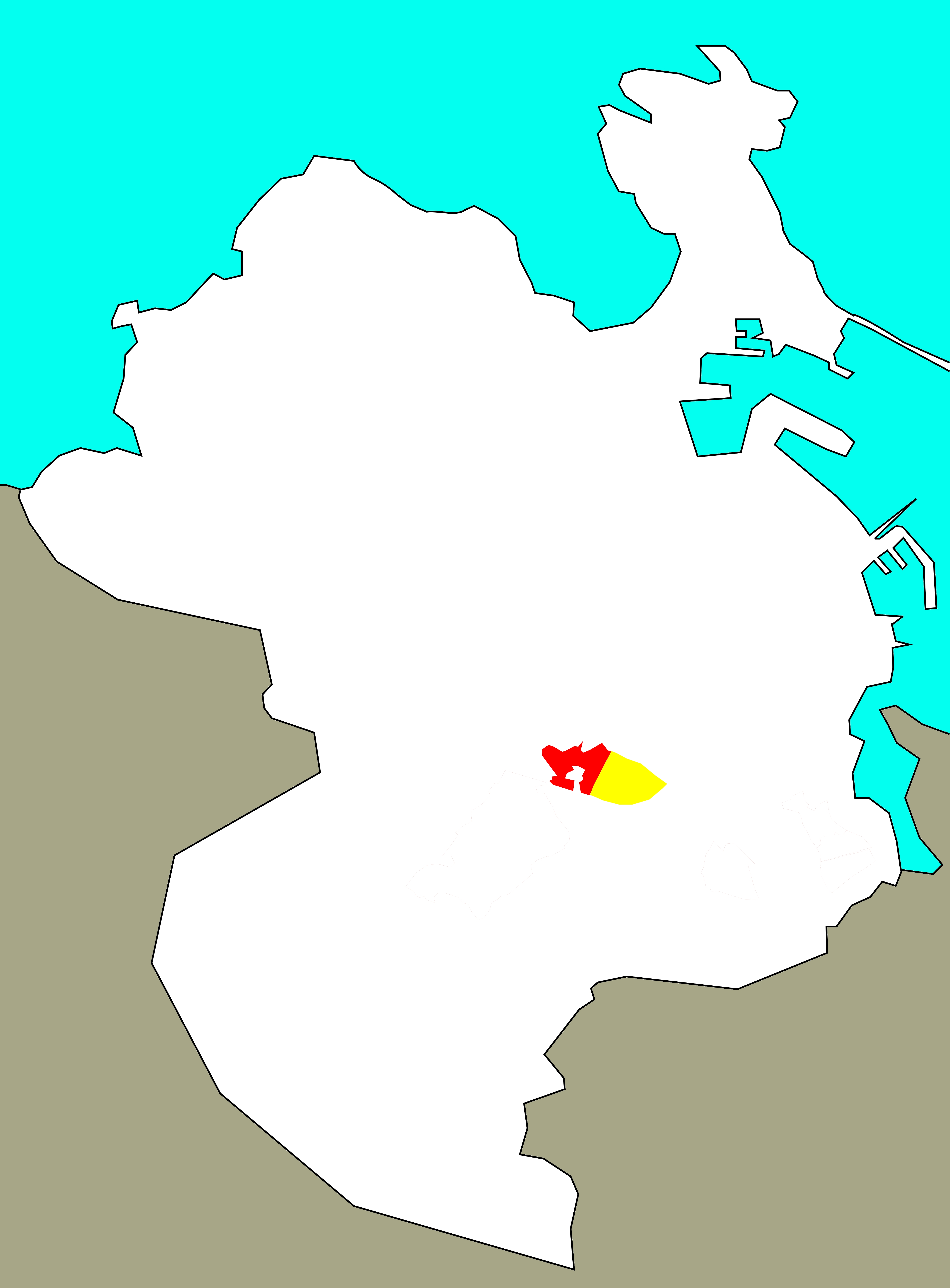 Situación de Someso (vermello) e o polígono de Someso (amarelo) no concello da Coruña.[1]